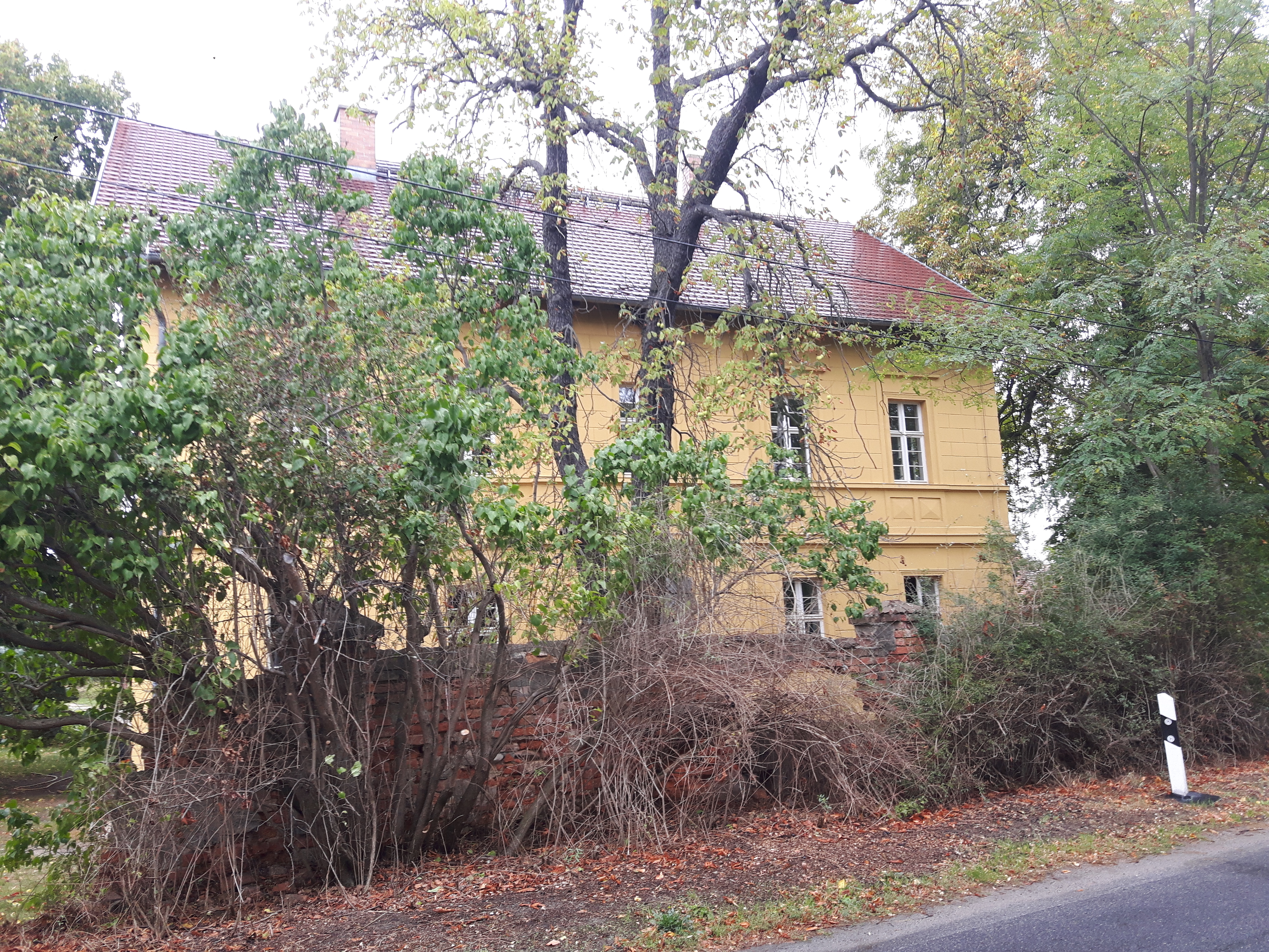 Denkmalgeschütztes Gutshaus in Belten bei Vetschau.